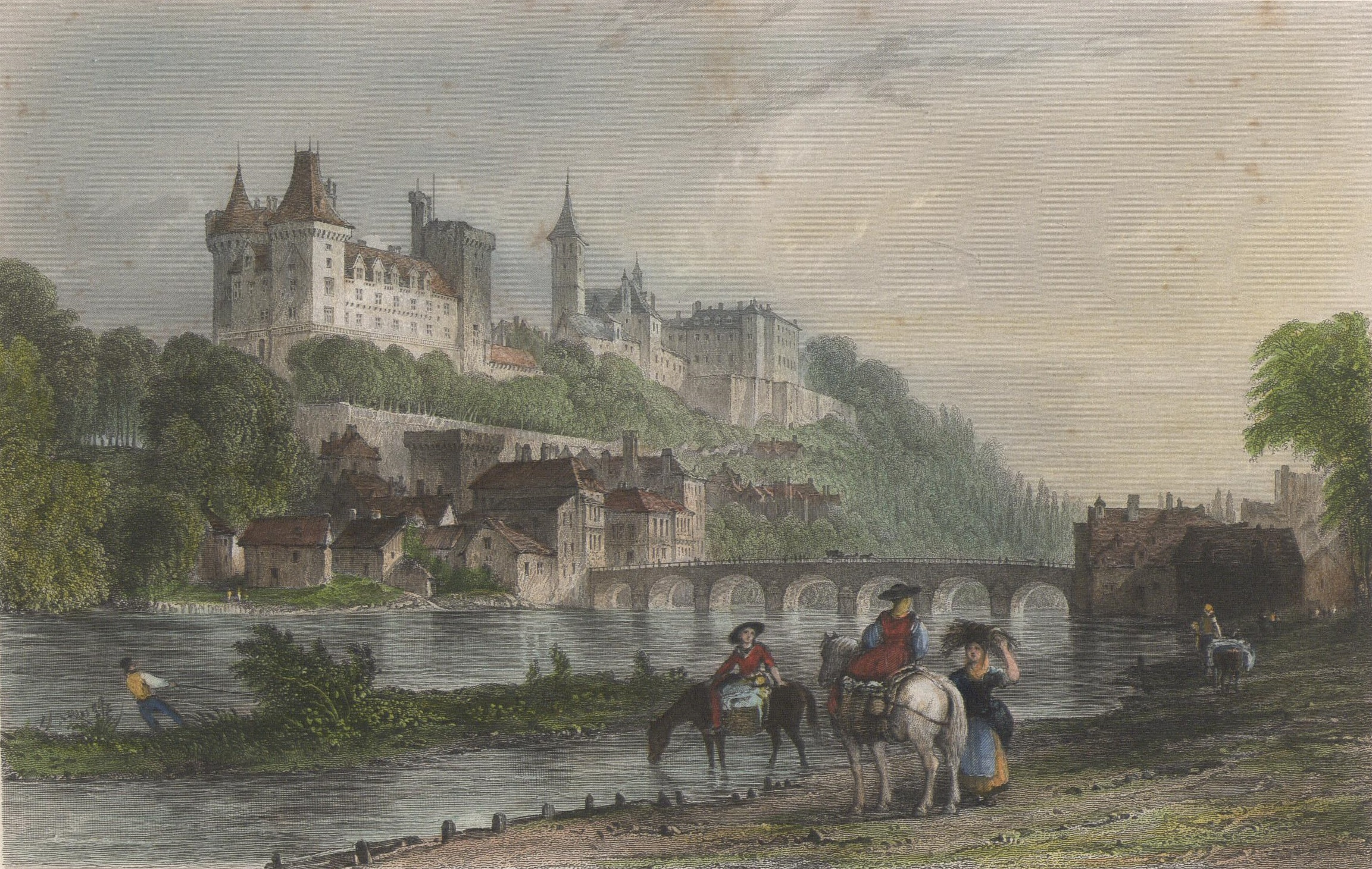 Extrait des trois volumes de "La France au XIXe siècle" de Thomas Allom, qui contient 19 planches concernant les Pyrénées (pl. 45, 49, 55, 62, 68, 75, 78, 80, 81, 83 (Tome II) et 5, 7, 16, 37, 42, 45, 65, 83, 85 (Tome III). Dans chaque tome le faux titre est gravé sur acier et rédigé en anglais. Les planches pyrénéennes ont souvent été réunies en albums, sans texte. Cet exemplaire réunit 22 gravures sur acier en noir et blanc concernant les Pyrénées et Toulouse. - Planches séparées Gravures exécutées par A. Willmore, C. T. Dixon, E. Radclyffe, J. Kernot, W. Floyd, R. Wallis, S. Fischer, J. C. Bentley, H. Adlard, Augs. Fox, J. Templeton, S. Bradshaw, J. Tingle, T. Turnbull, J. Carter, d'après les dessins de T. Allom Ancely, René (1876 - 1966). Possesseur